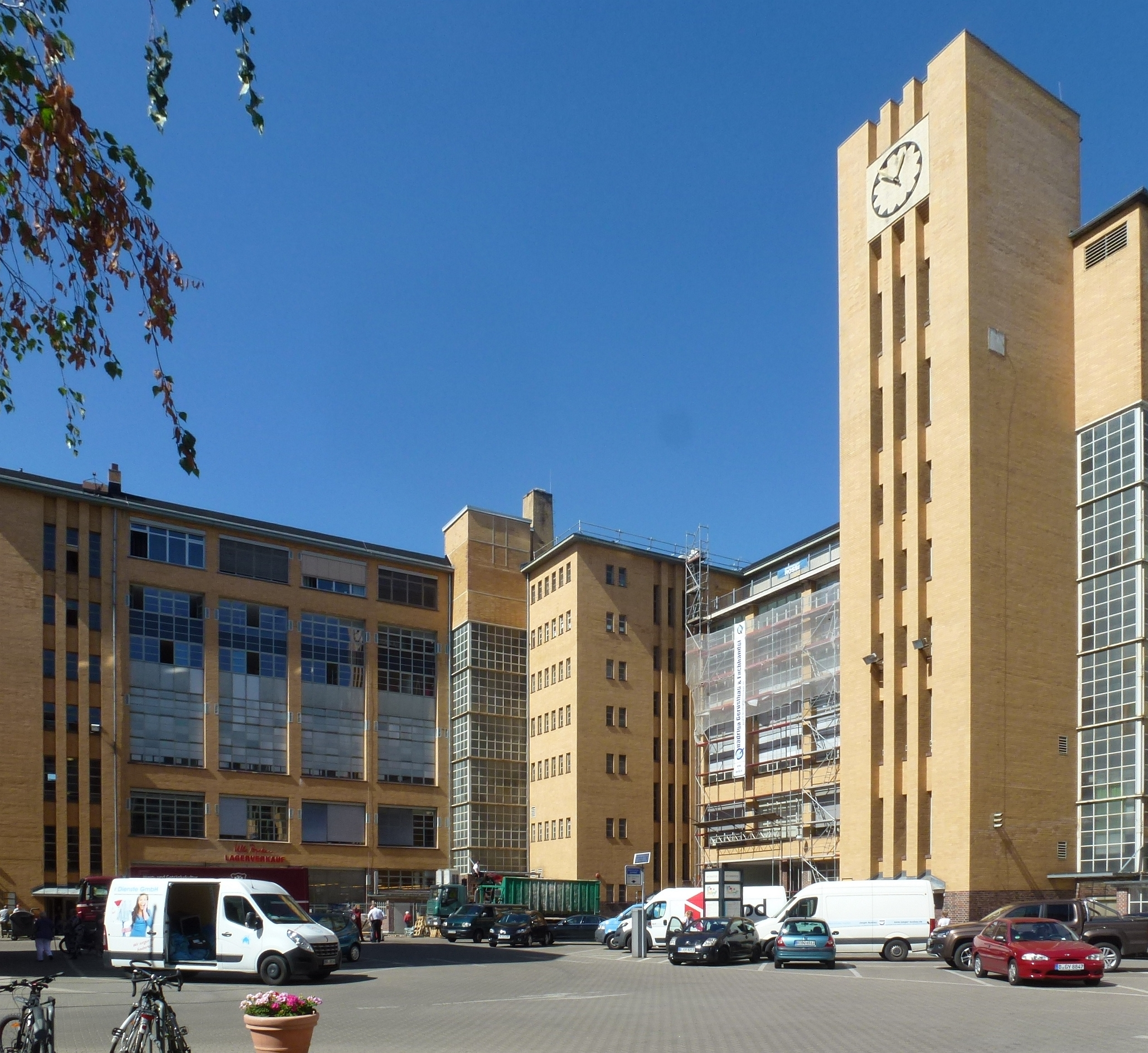 Berlin-Wedding Osram-Höfe